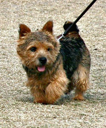 Norwich Terrier